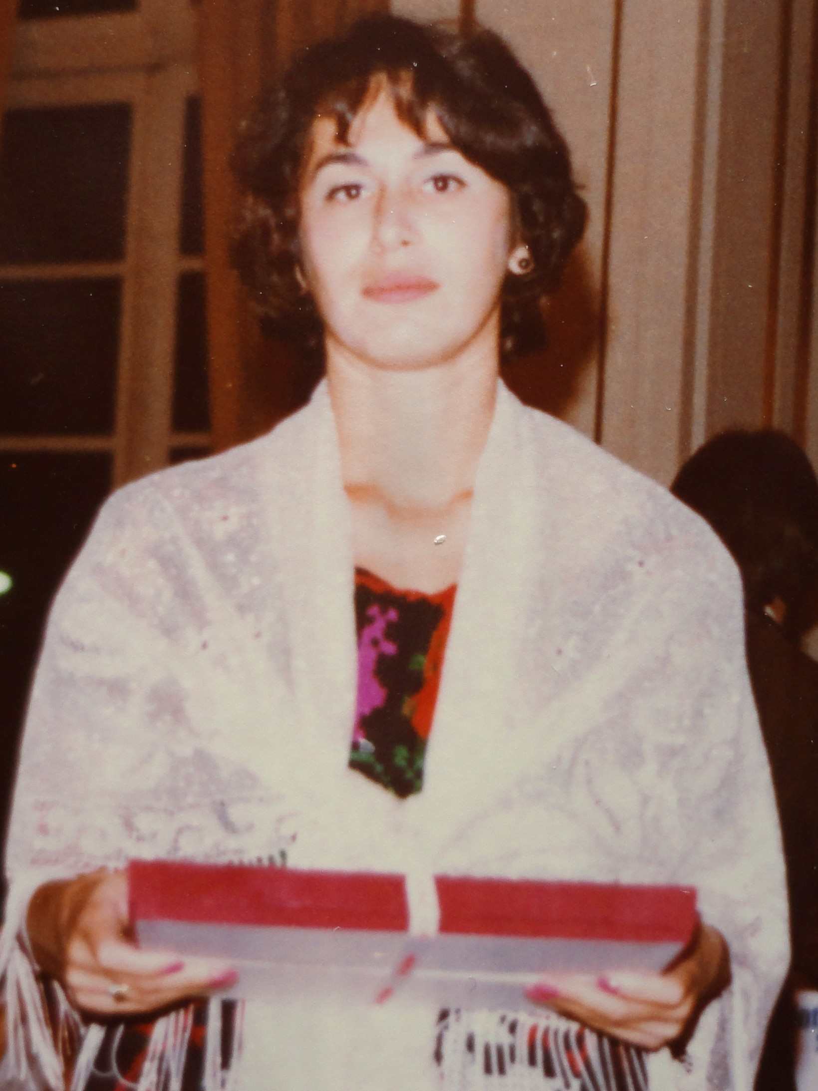 Nana Alexandria, Siegerehrung bei dem Interzonenturnier 1979 in Rio de Janeiro.